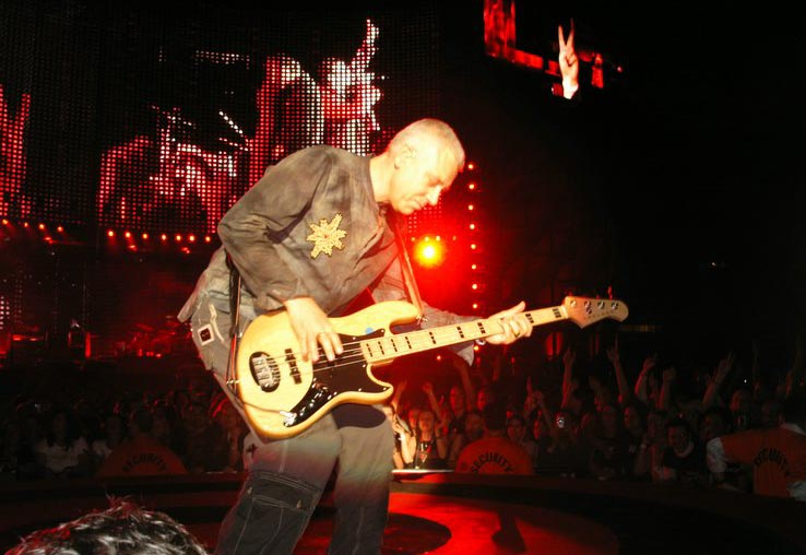 Bildbeschreibung: U2-Konzert am 2. Juli 2005 in Wien Quelle: Fotograf: Tobias Schleser (selbst fotografiert) Datum: 02.07.2005